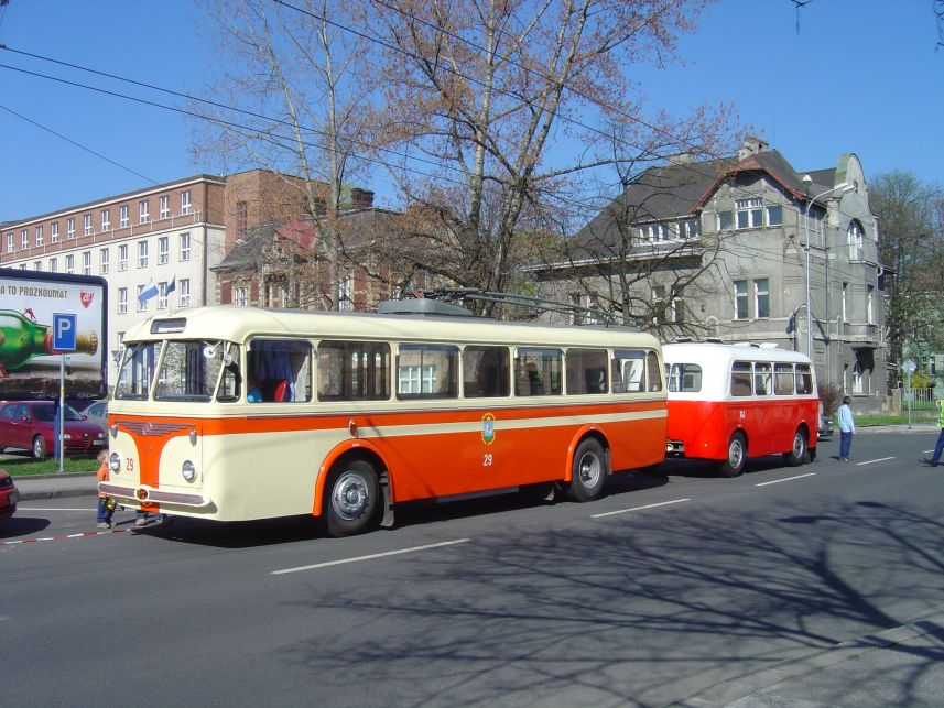 Historický trolejbus Škoda 8Tr s přívěsem Karosa B 40, Náměstí Republiky, Moravská Ostrava